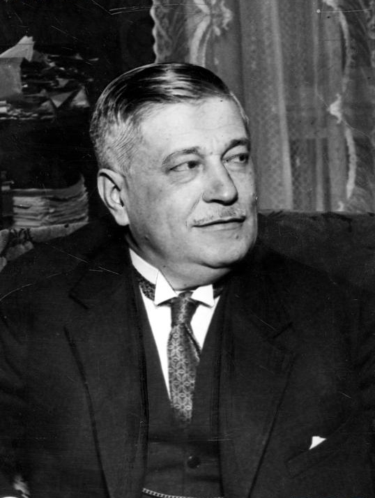 Gabriel Czechowicz, minister skarbu.